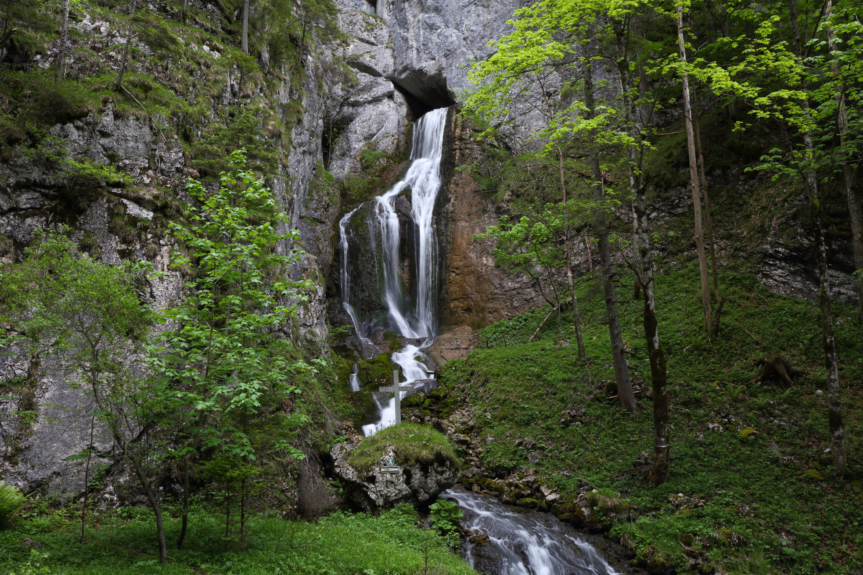 Karstquelle und Wasserfall Totes Weib, Mürzsteger Alpen.